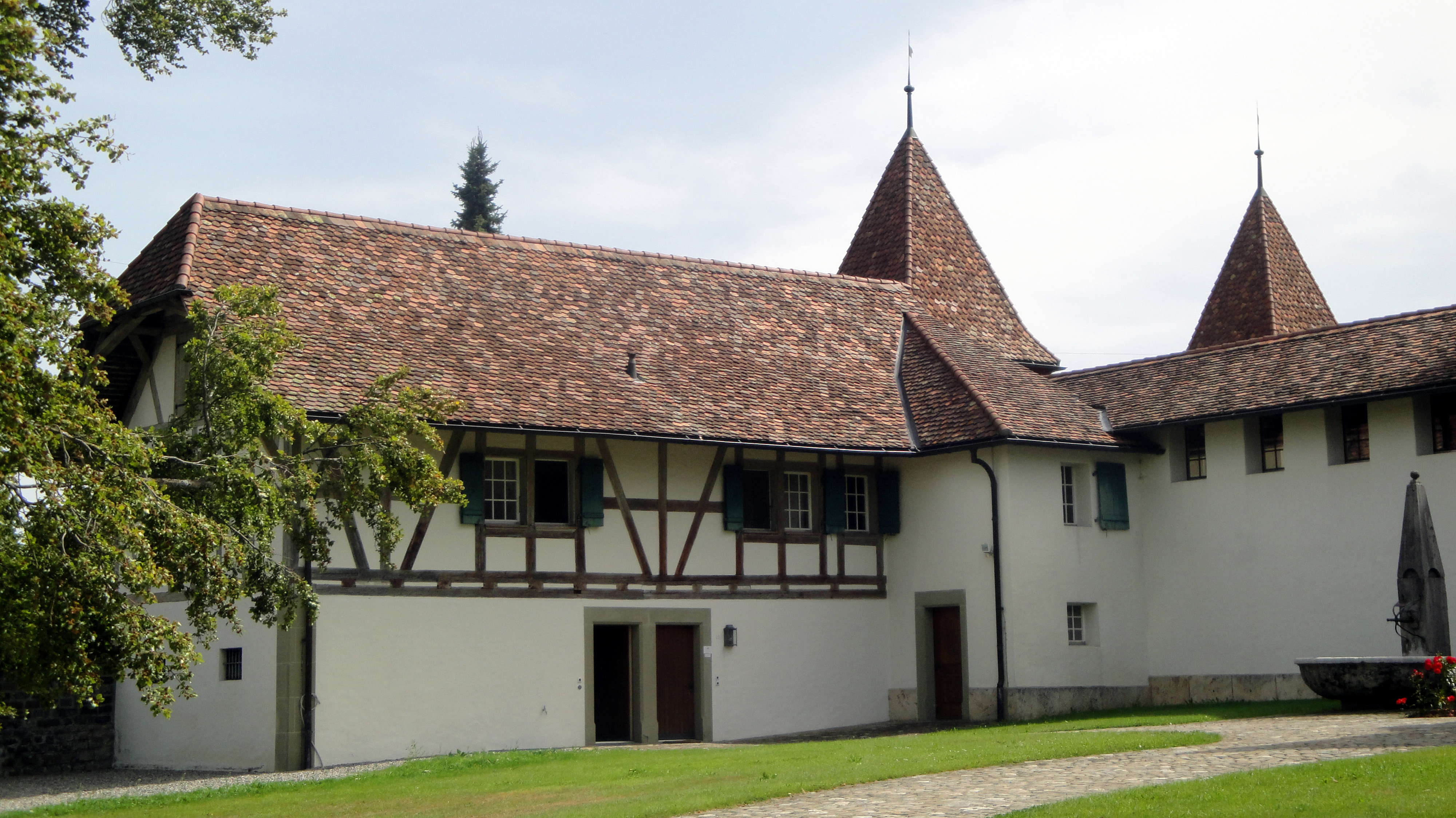 Schwarzenburg BE, Schloss